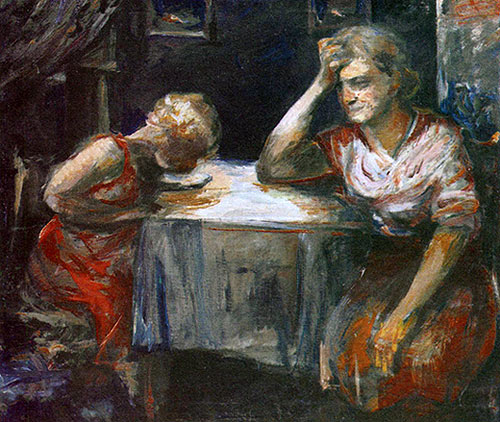 Роздум